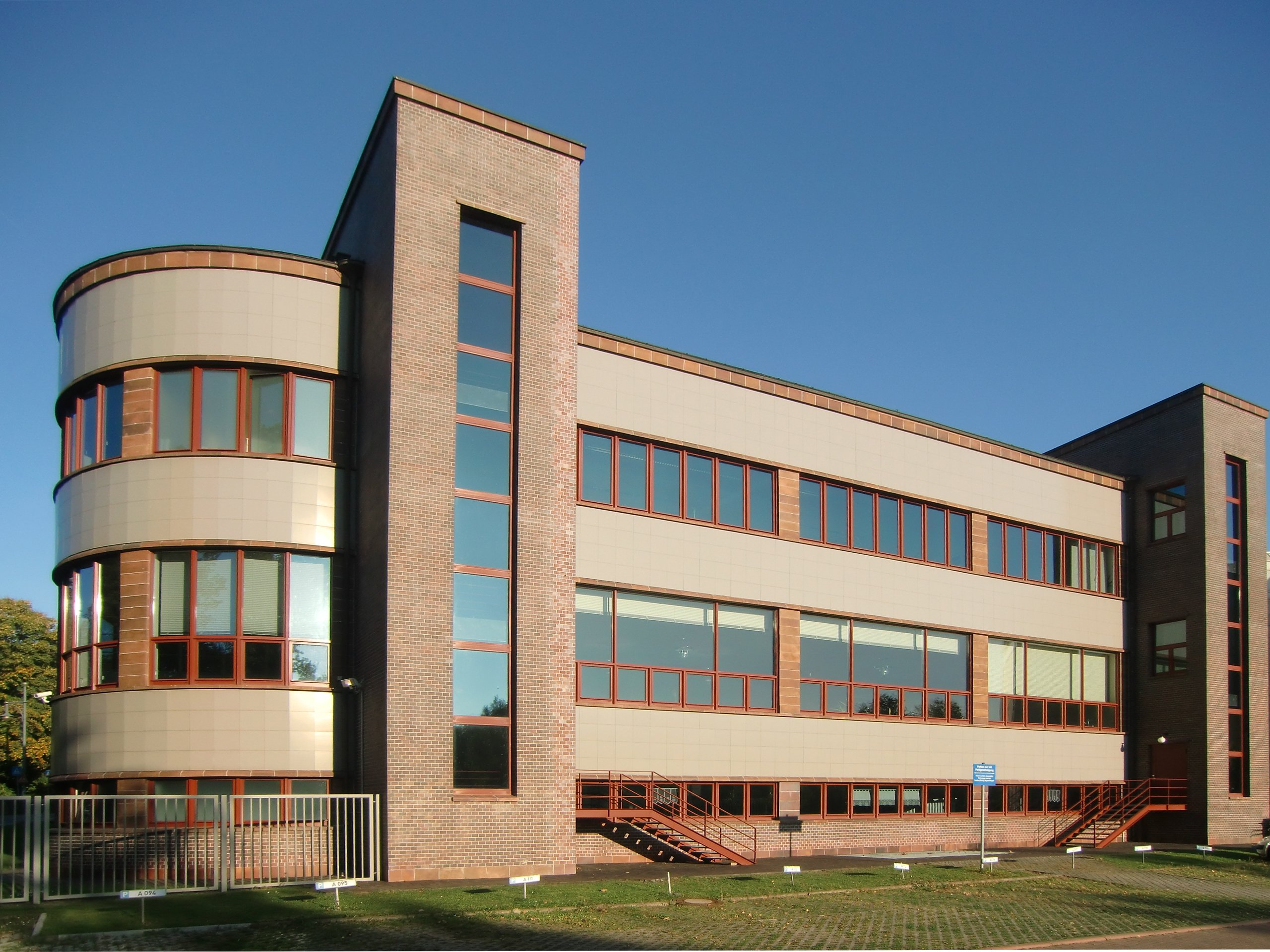 AOK-Gebäude in Halle, 1929-1931, Architekt Martin Knauthe